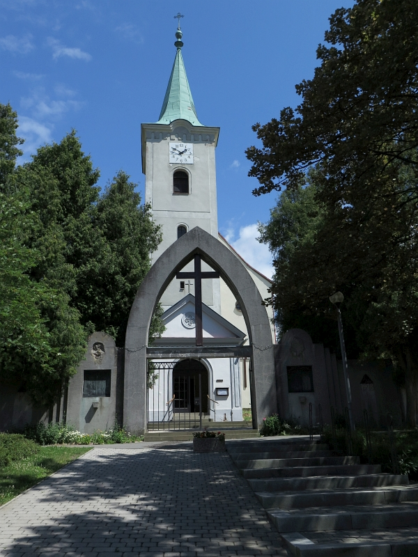 Kostel svatého Matouše, v obci, Červená Voda.